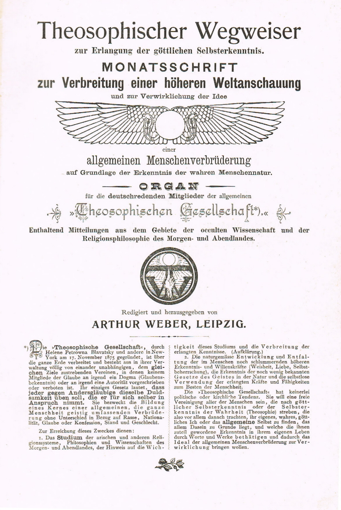 Titelblatt der Schrift Theosophischer Wegweiser. Monatschrift zur Verbreitung einer höheren Weltanschauung.